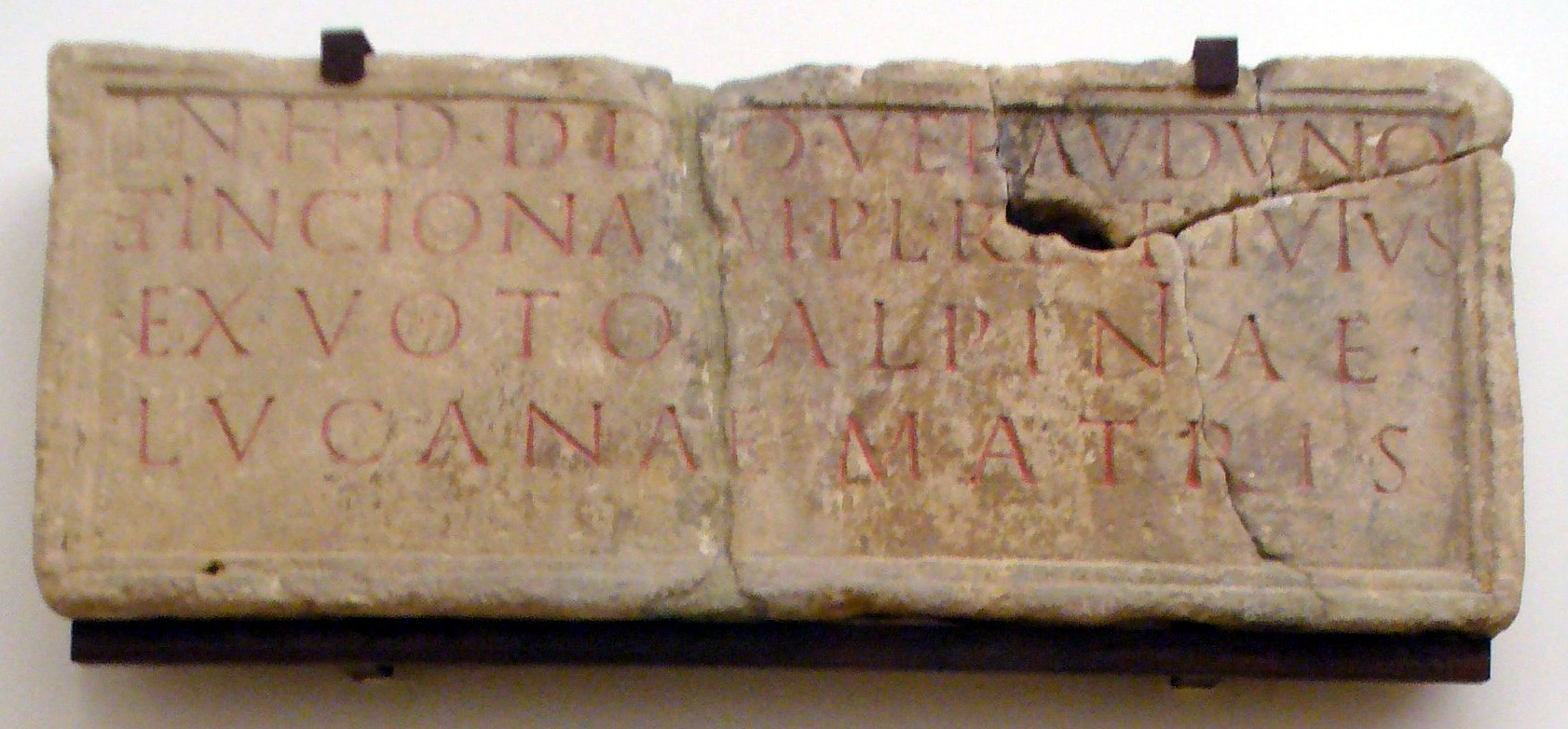 Un ex-voto dédié au dieu Veraudunus et à Inciona. Trouvé au Widdenberg dans la commune luxembourgeoise de Betzdorf en 1915 ; maintenant dans le Musée national d'histoire et d'art à Luxembourg. Texte complet : "In · H · D · D · Deo Veravdvno et · Incionae M · Pl · Restitvtvs ex · voto · Alpiniae Lvcanae · matris".